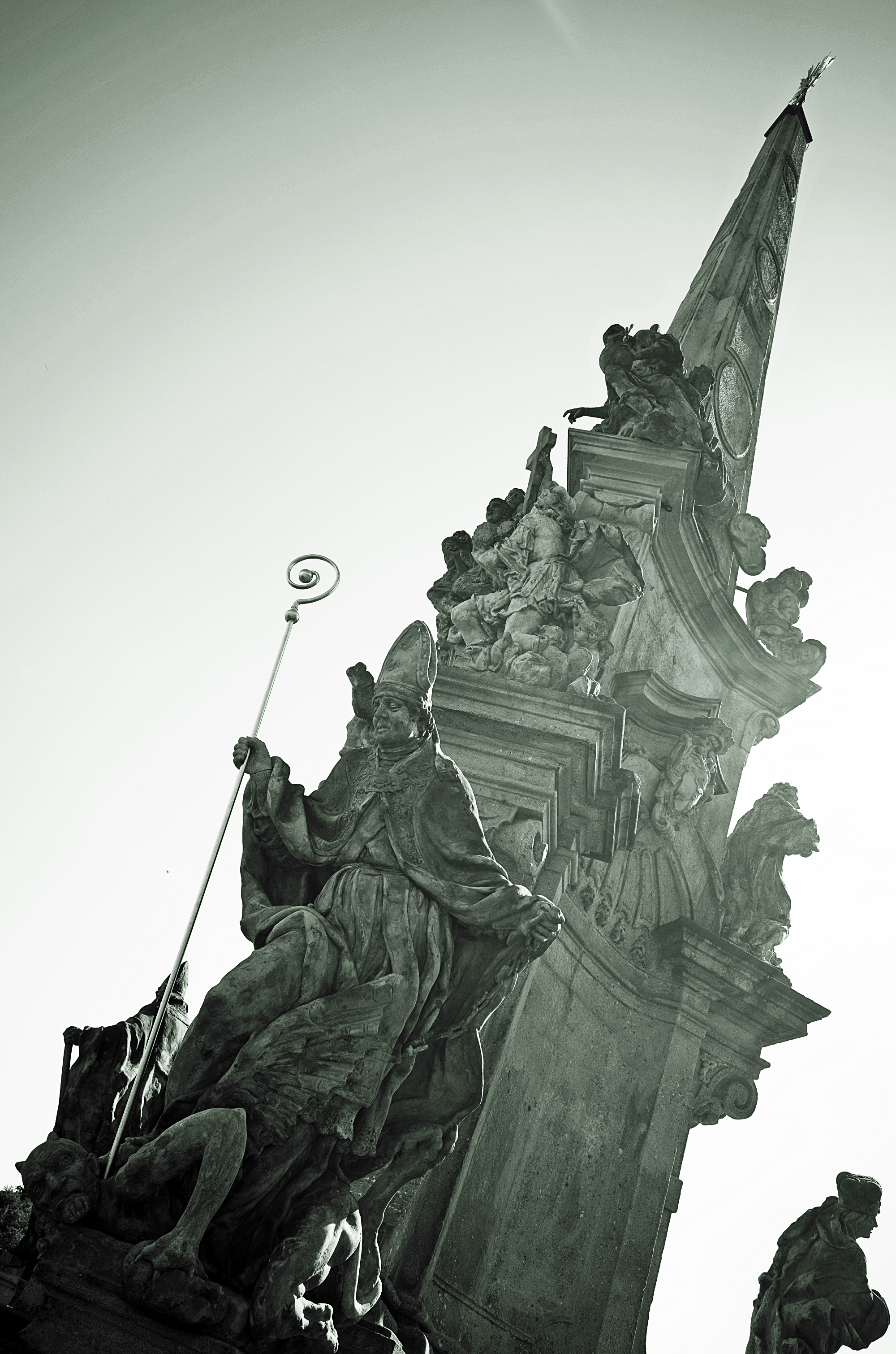 Socha Svatého Prokopa z dílny Mayáše Bernarda Brauna stojící ve Valeči.